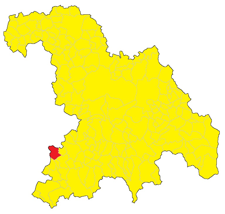 Mappa del comune di Bistagno (AL).